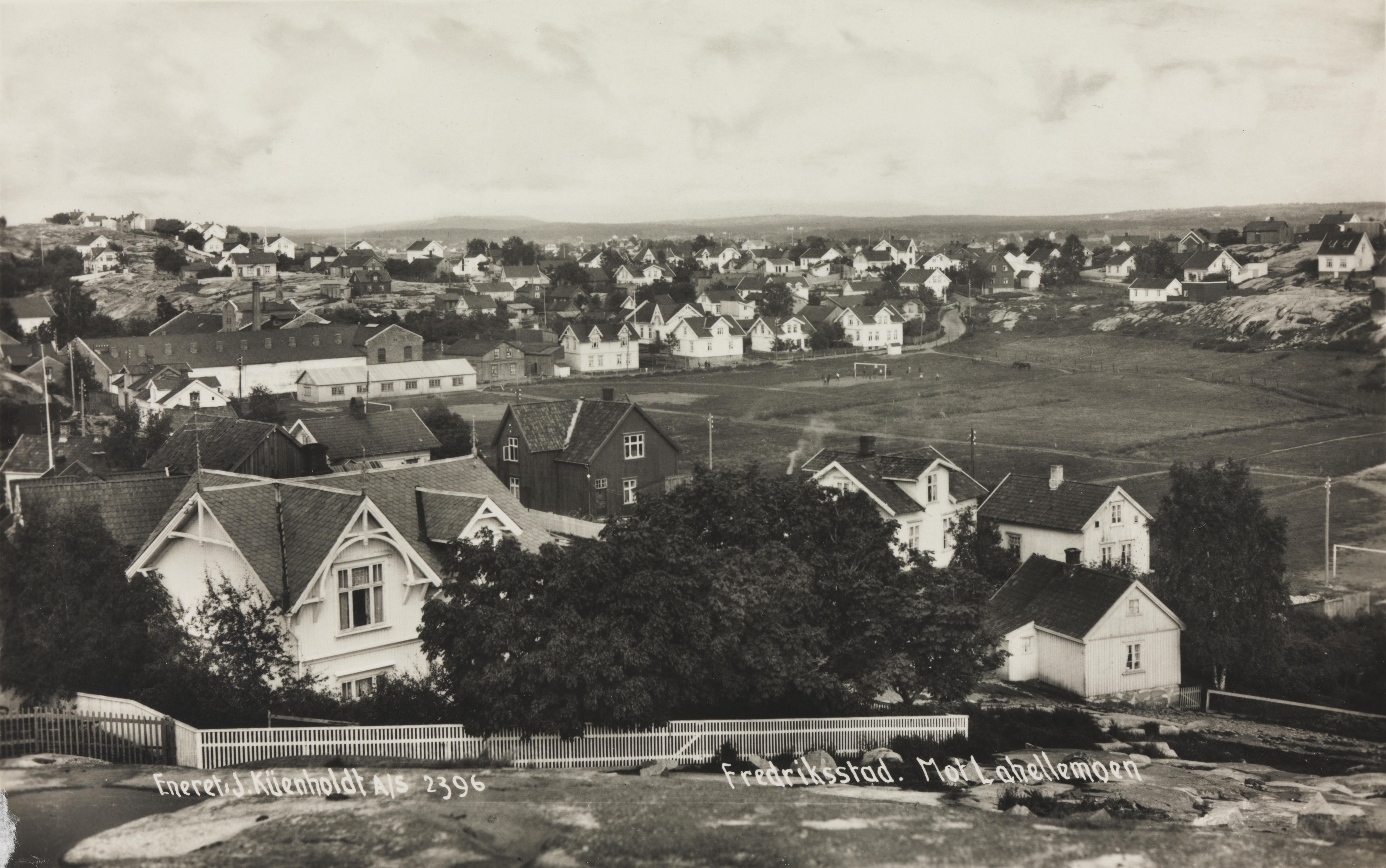 Bildet er hentet fra Nasjonalbibliotekets bildesamling Lahellemoen, Fredrikstad, Østfold